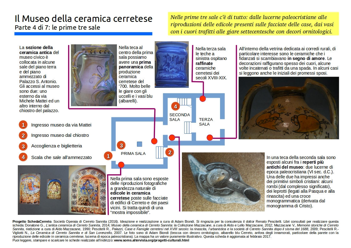 Mappa e descrizione delle prime tre sale del museo civico della ceramica cerretese, Cerreto Sannita (Benevento).